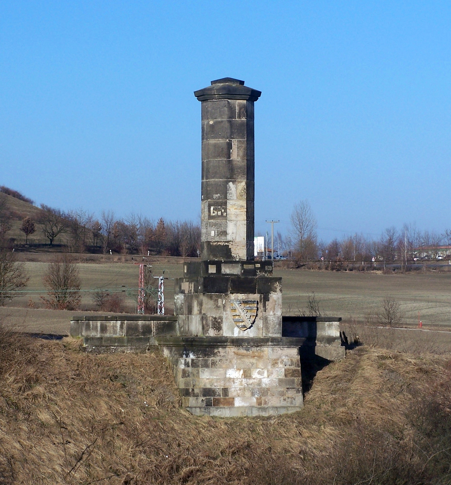 Denkmal für den abgetragenen Oberauer Tunnel, Gedenksäule aus dem Originalmaterial der Portalbekrönung, Blick vom gegenüberliegenden Hang. Oberau, Gemeinde Niederau, Landkreis Meißen